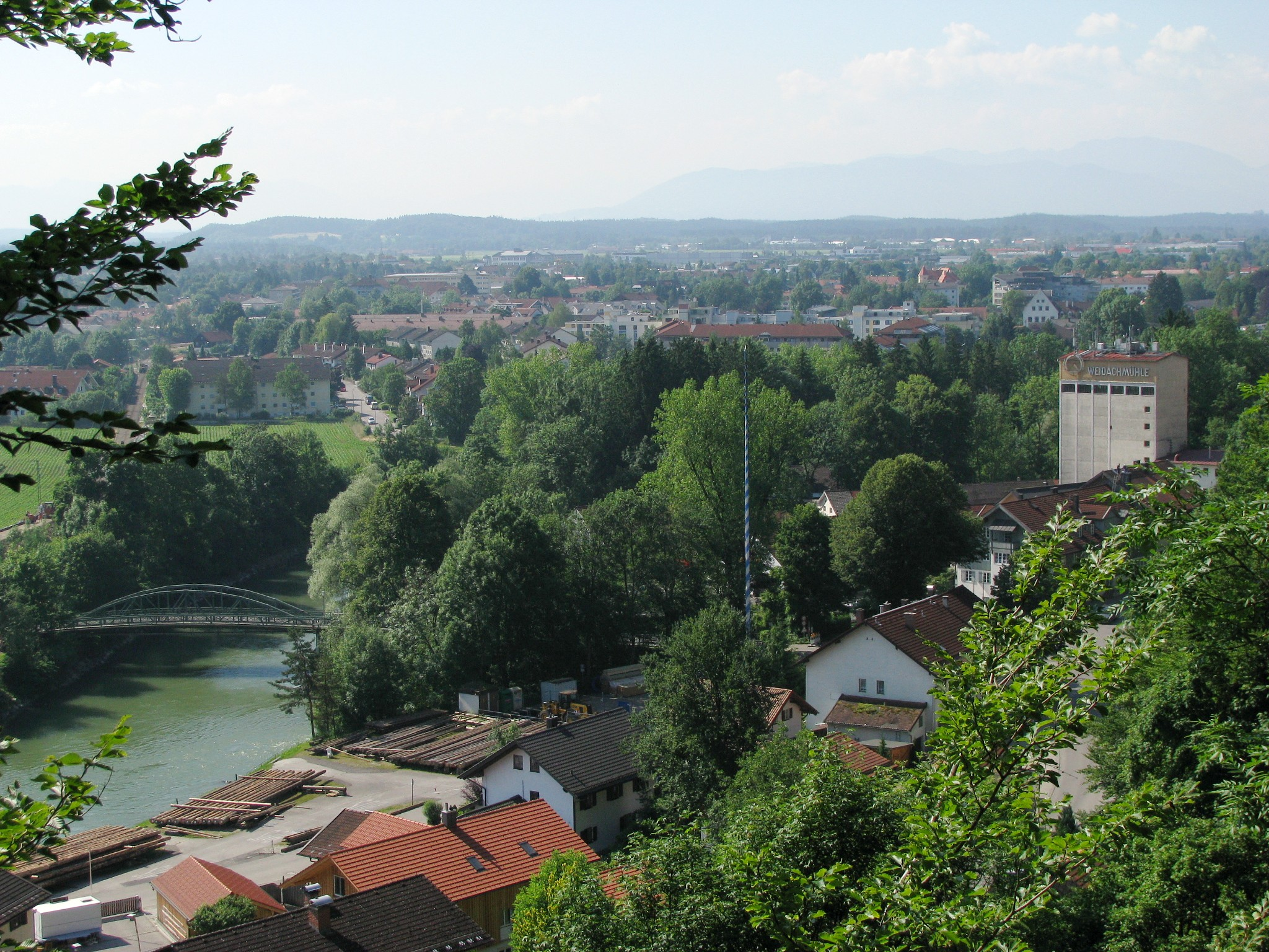 Wolfratshausen, von der Bundesstraße 11 an der nördlichen Stadtgrenze aus gesehen nach Süden